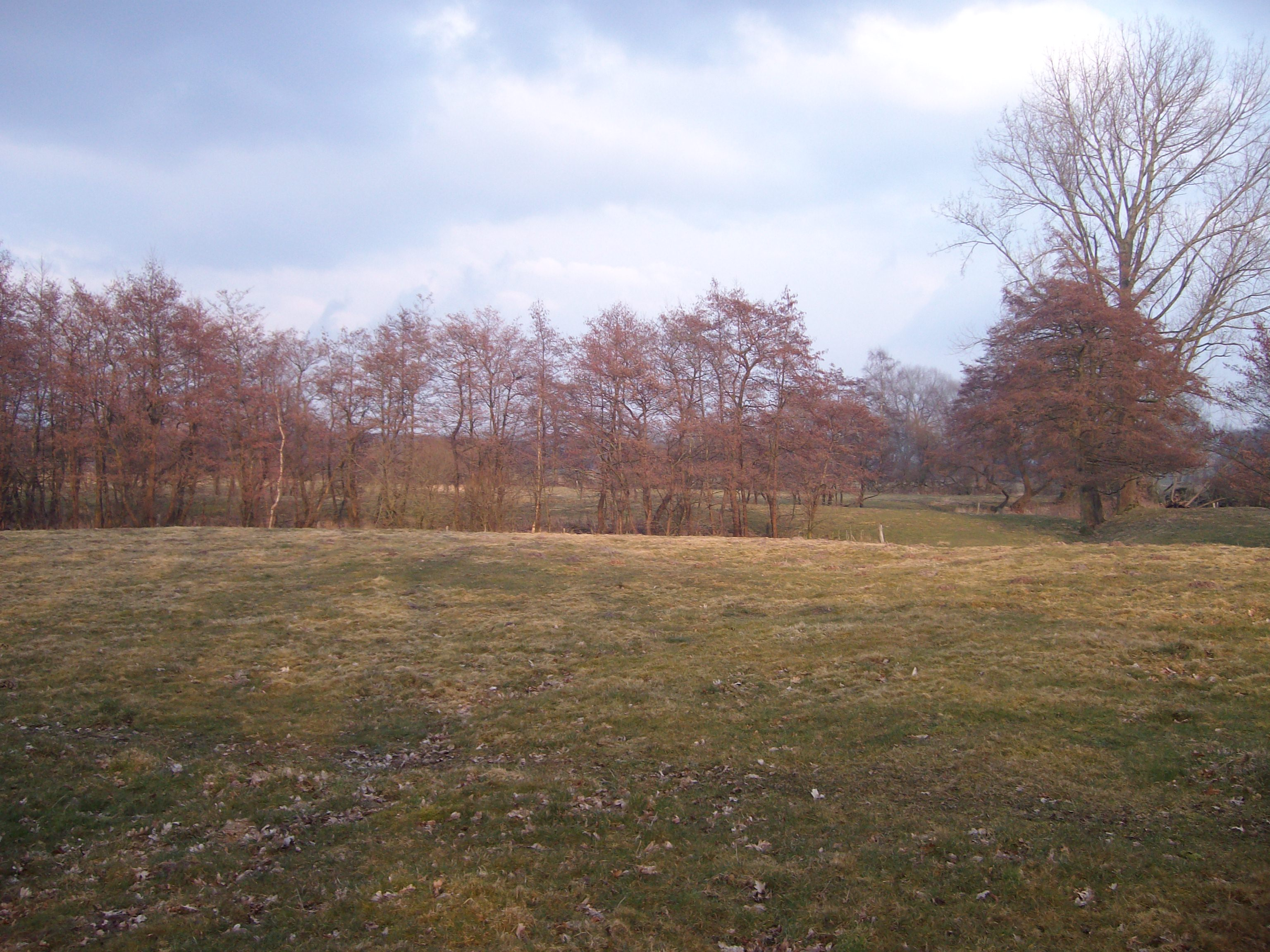 Dieler Schanze, Ostfriesland, Niedersachsen, Deutschland